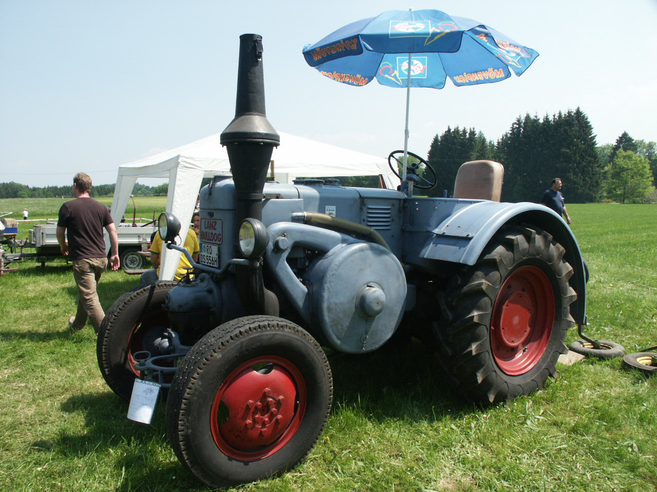 Lanz GK, Baujahr 1939